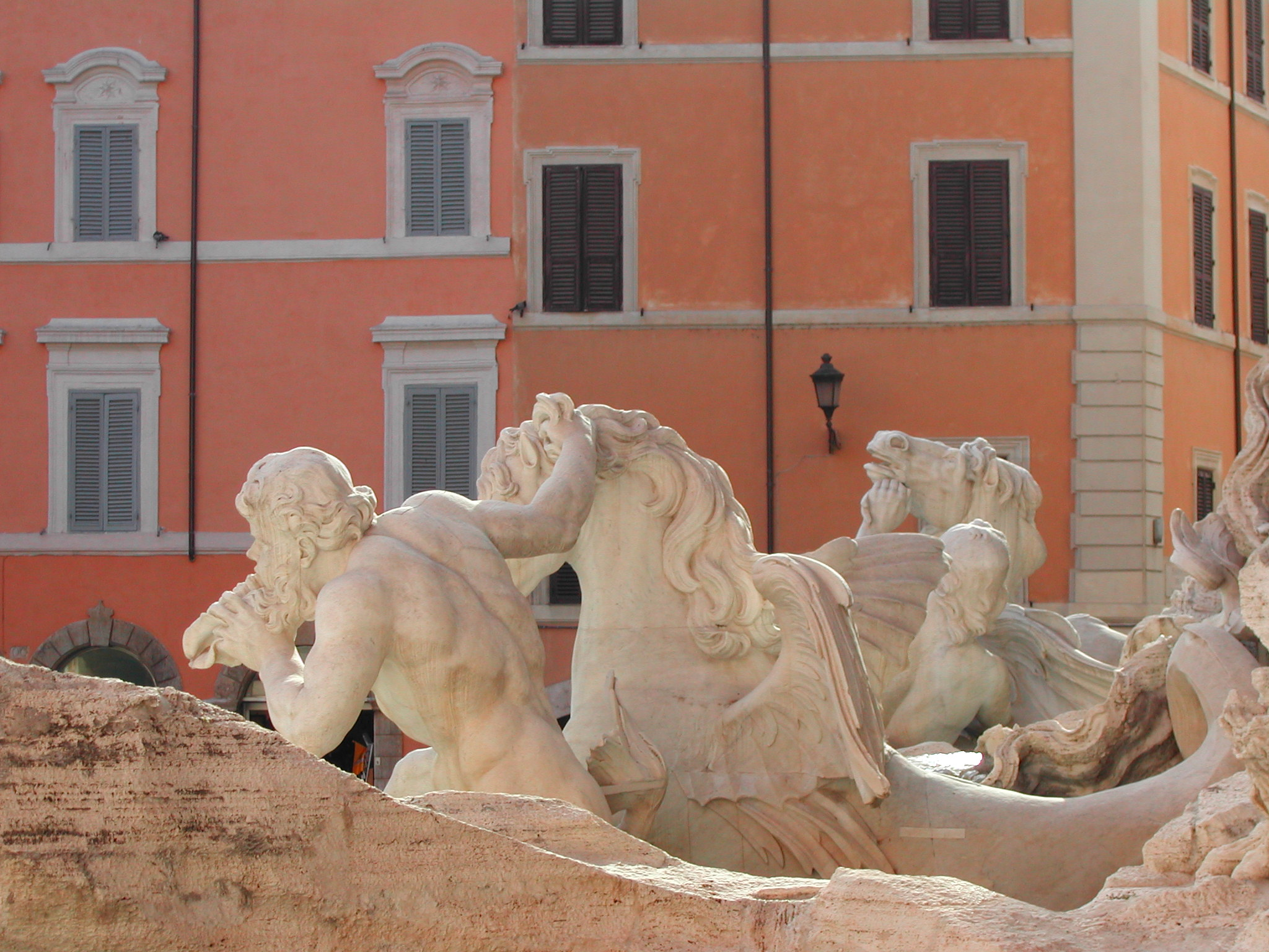 Roma, Fontana di Trevi: tritone (particolare)